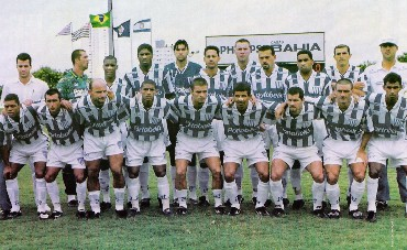 Time do Avaí Campeão Brasileiro de 1998. Foto escaneada na data mensionada.